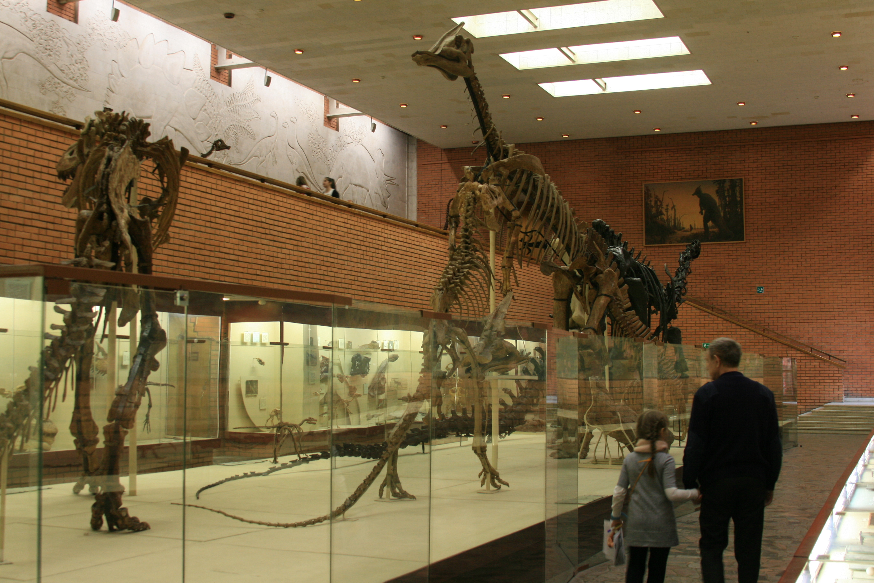 Палеонтологический музей имени Ю. А. Орлова РАН.